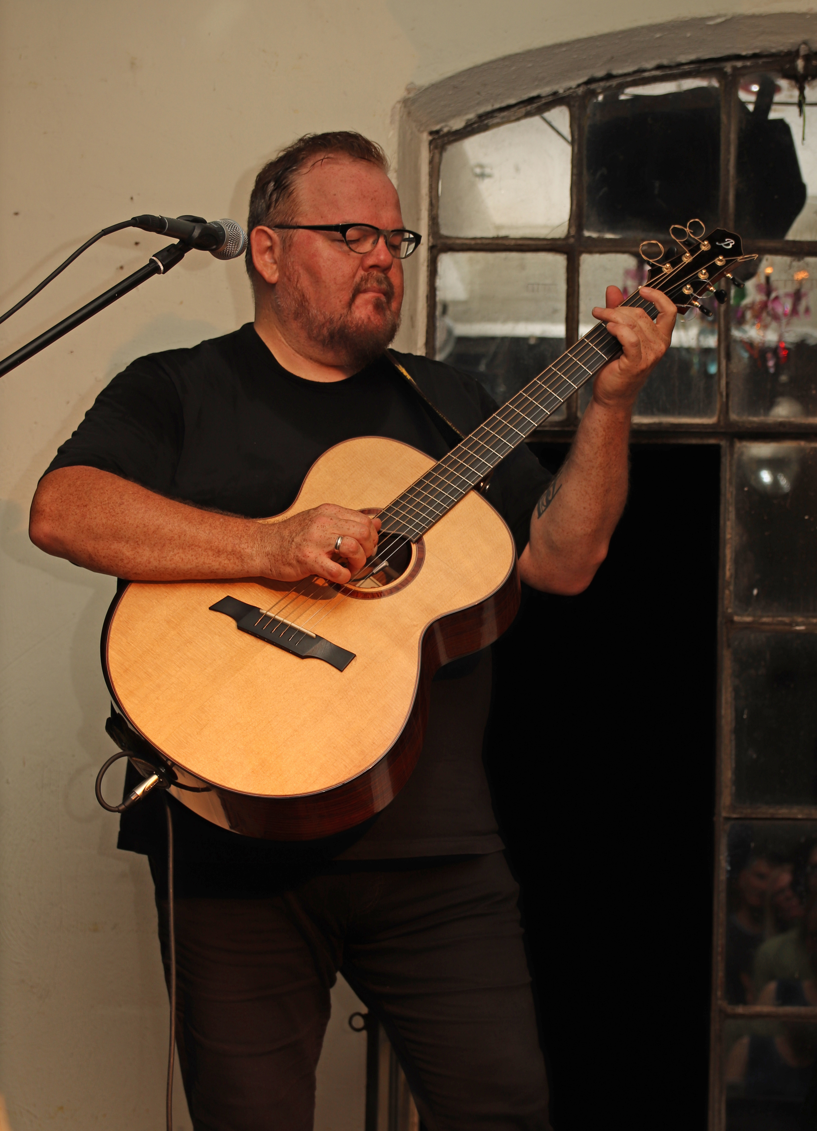 Don Ross bei einem Auftritt in der Kofferfabrik (Fürth)